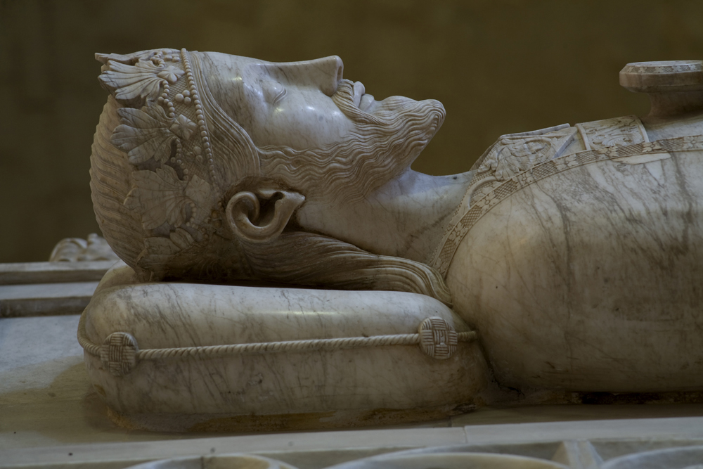 unidentified Spain